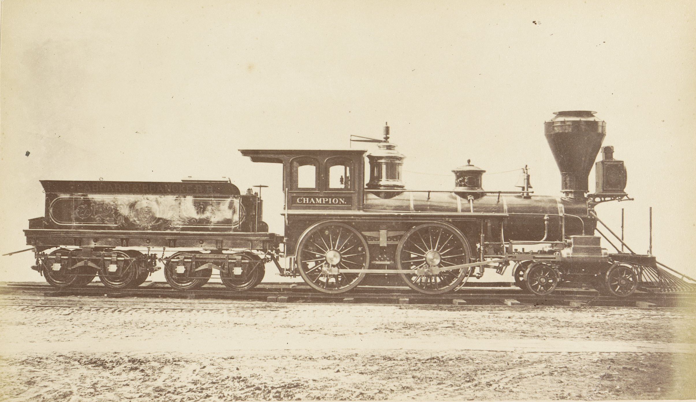 IdentificatieTitel(s): StoomlocomotiefObjecttype: foto bladzijde Objectnummer: RP-F-2001-7-1481-5VervaardigingVervaardiger: fotograaf: George Gardner Rockwood (mogelijk)Datering: ca. 1861 - in of voor 1871Materiaal: fotopapier Techniek: albuminedrukAfmetingen: foto: h 122 mm × b 215 mmOnderwerpWat: steam locomotiveVerwerving en rechtenCredit line: Aankoop met steun van de Mondriaan Stichting, het Prins Bernhard Cultuurfonds, het VSBfonds, het Paul Huf Fonds/Rijksmuseum Fonds en het Egbert KunstfondsVerwerving: aankoop 2001Copyright: Publiek domein